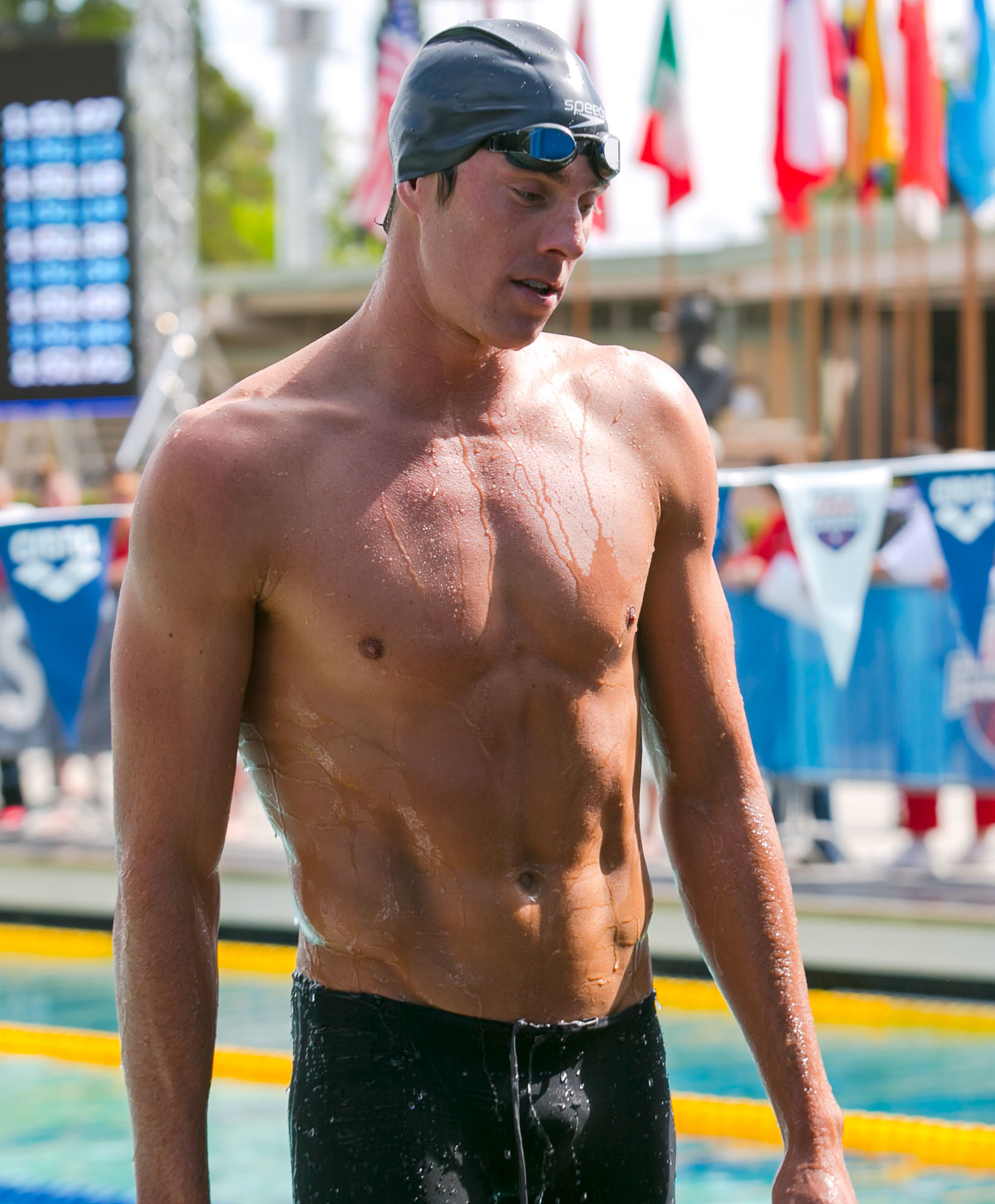 2017 Santa Clara Grand Prix